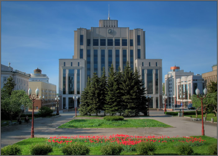 Госсовет Татарстана